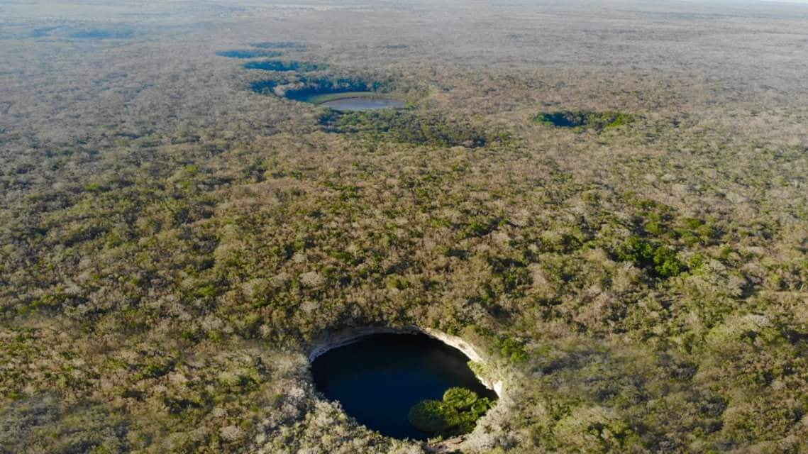 Se representa un atractivo turistico